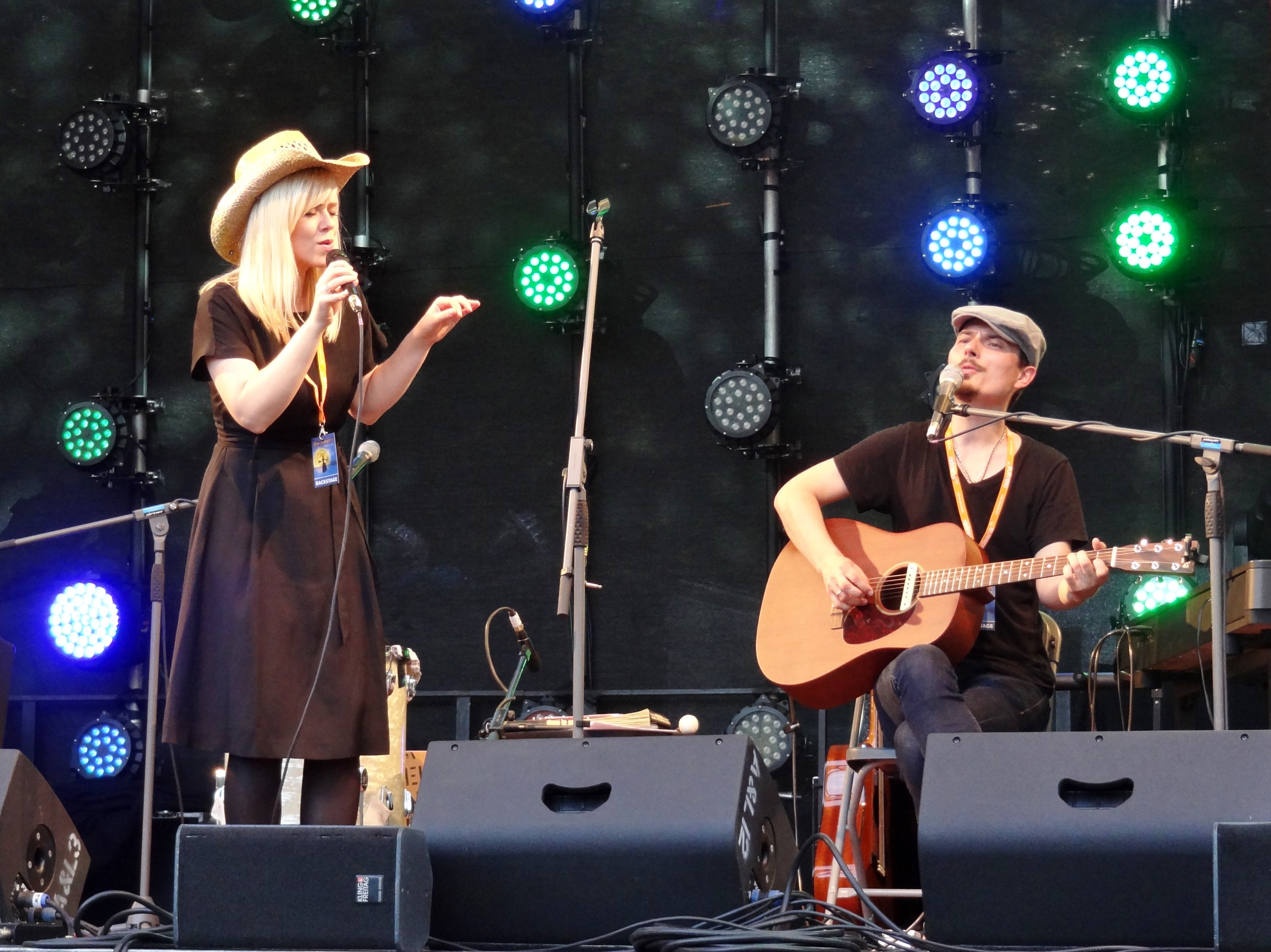 Carolin No beim 13. Inselleuchten-Festival in Marienwerder, Land Brandenburg, Deutschland